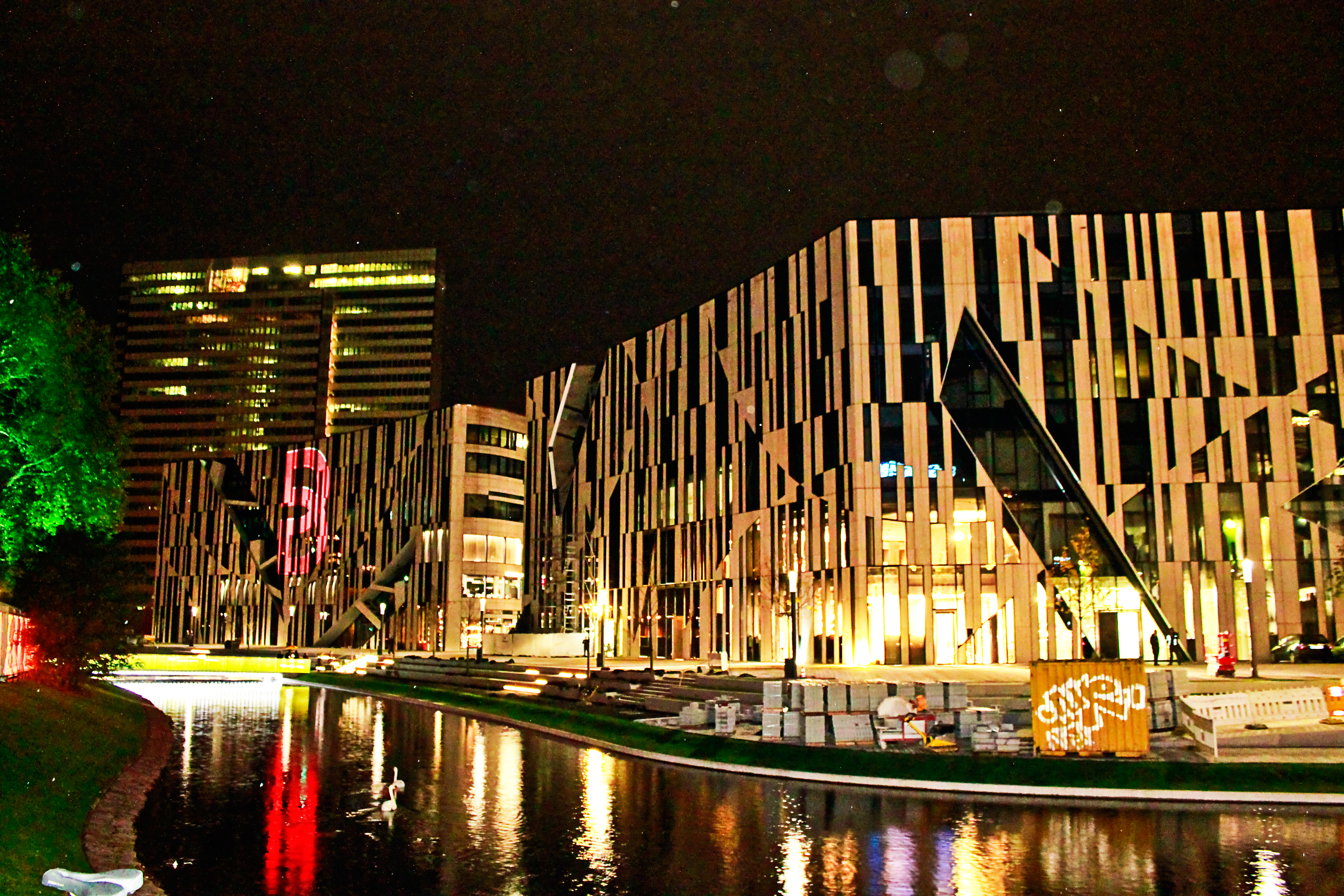 Teileröffnung Kö-Bogen mit Breuninger-Logo und Landskrone-Gewässer. Im Hintergrund das Dreischeibenhaus. 2013.